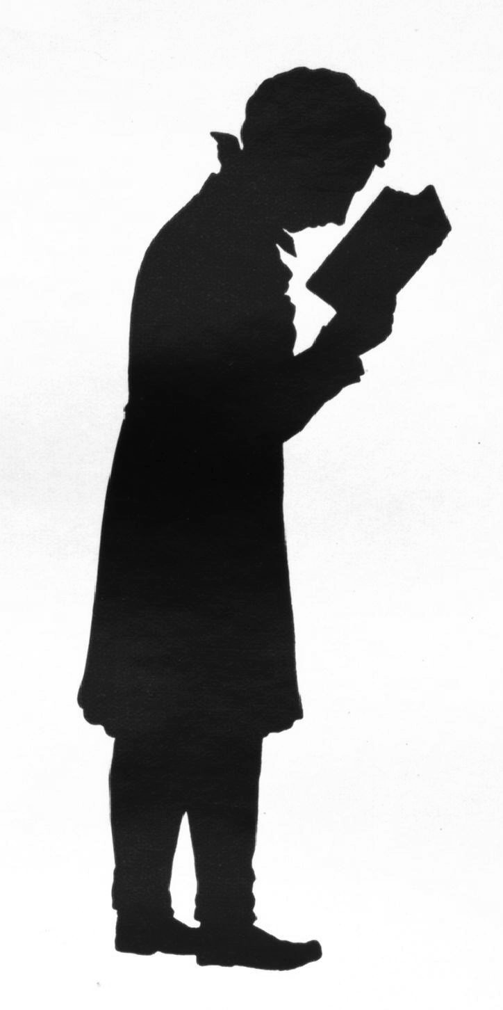 Luise Duttenhofer: Ludwig Uhland als Advokat, schwarzer Scherenschnitt, Höhe 12,0 cm, Entstehungsjahr 1817, Marbach, Deutsches Literaturarchiv.